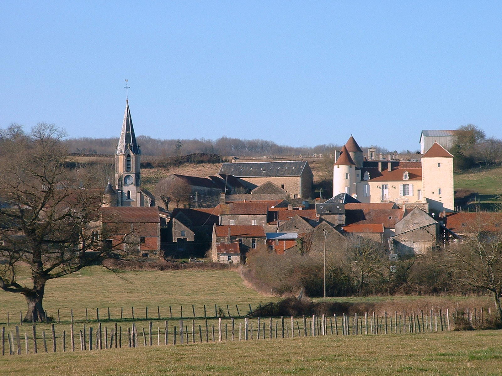 Thory (Yonne) : vue générale